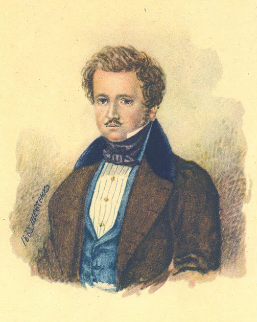 Портрет Павла Васильовича Енгельгардта. Portrait of Paul Vassilievich Engelhardt